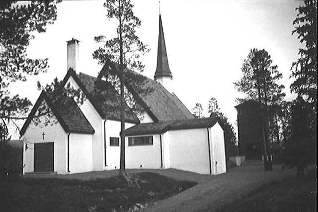 Kopperå kapell